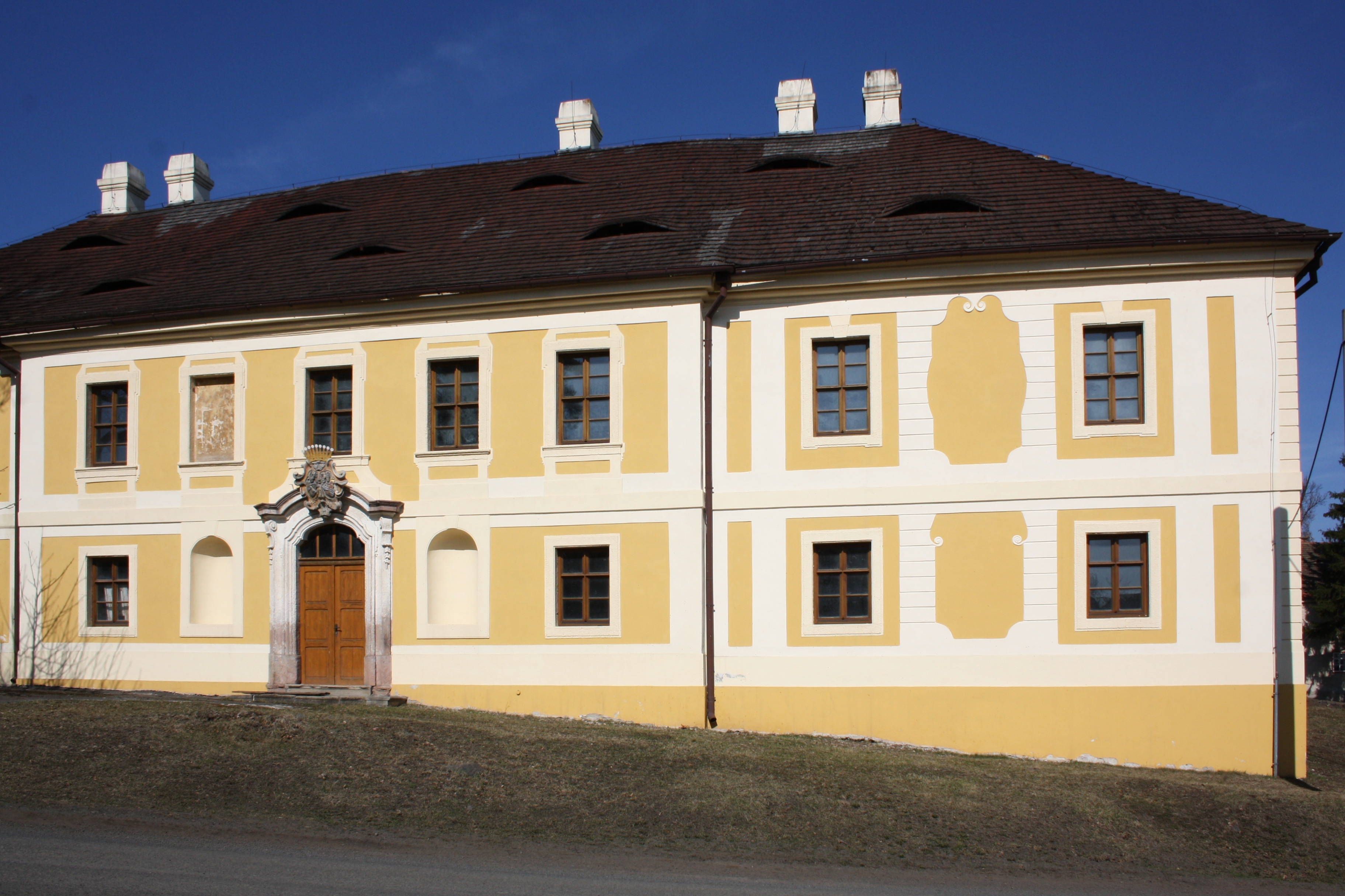 Valeč